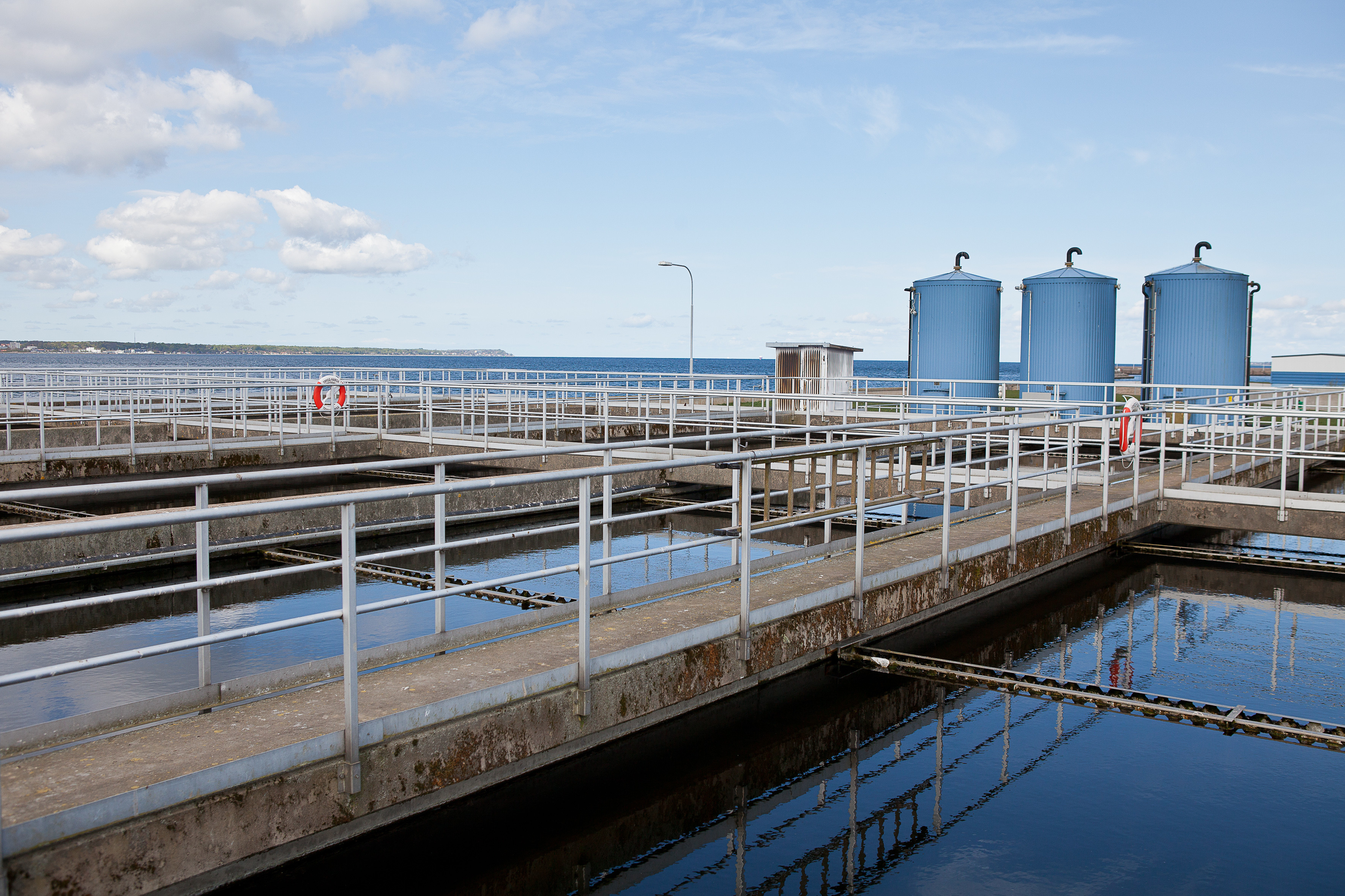 NSVAs största reningsverk, Öresundsverket i Helsingborg.